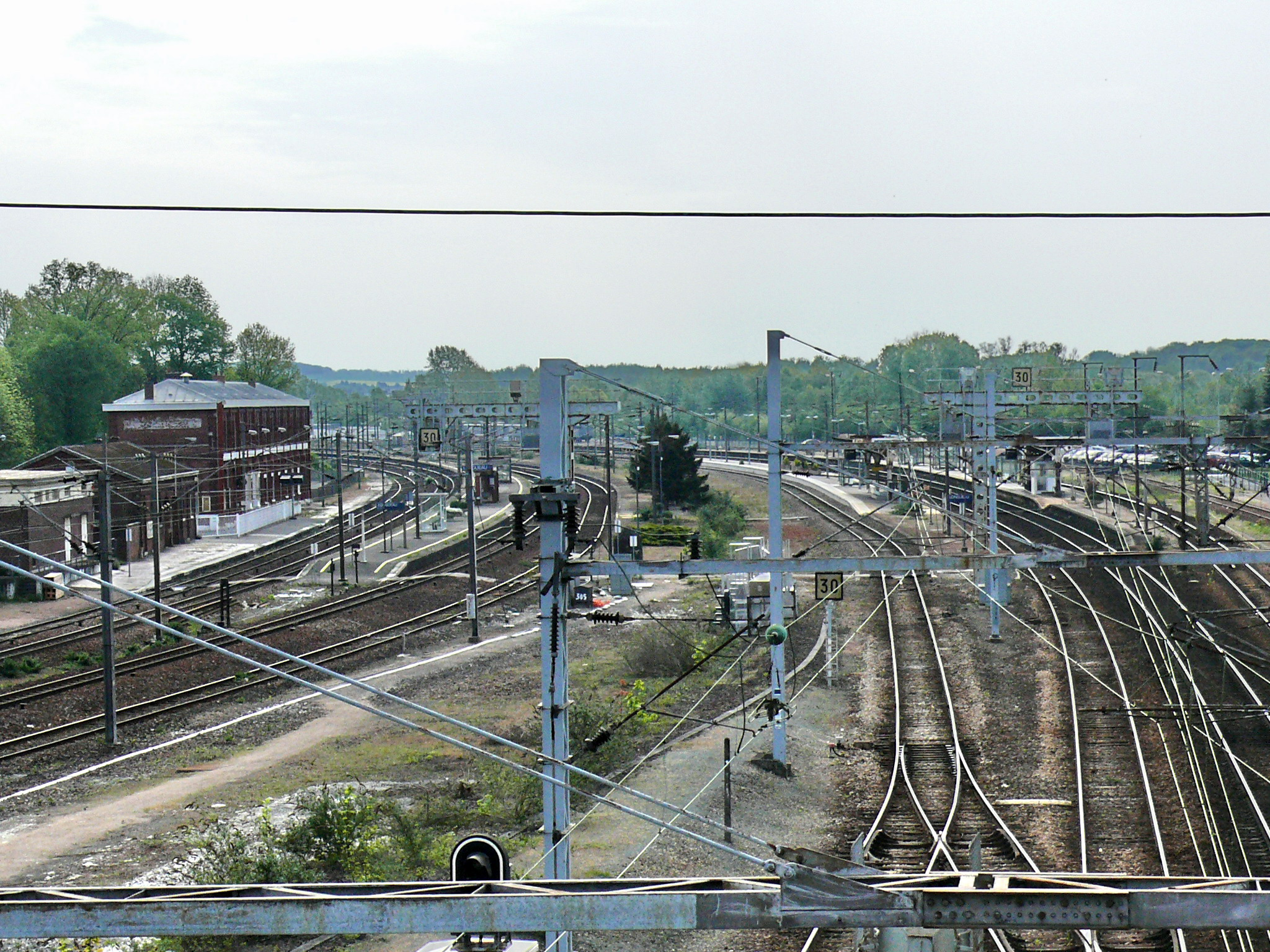 Vue des voies de la Gare de Longueau